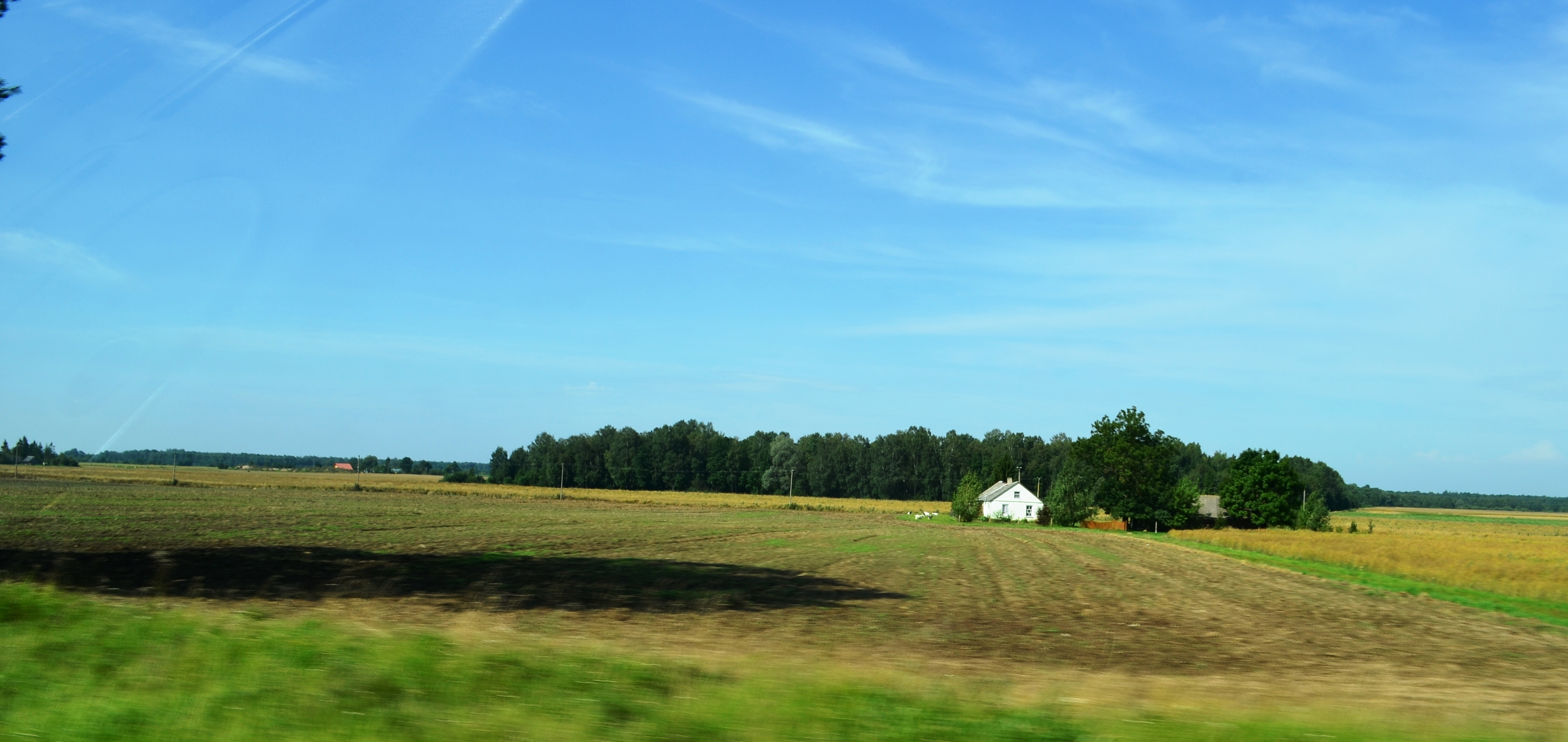 Masiokai, Panevėžio r.